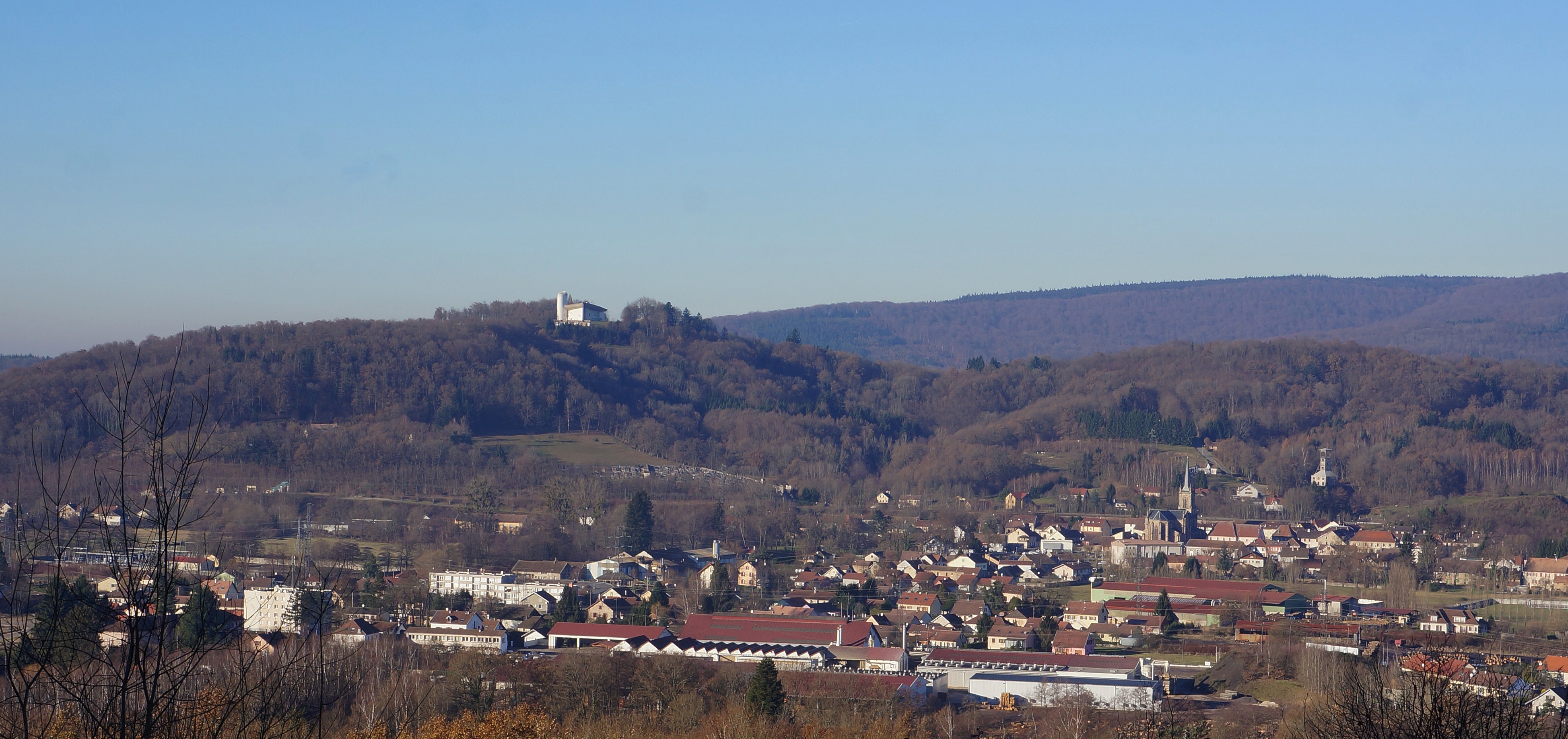 La colline de Bourlémont (Ronchamp, Haute-Saône).